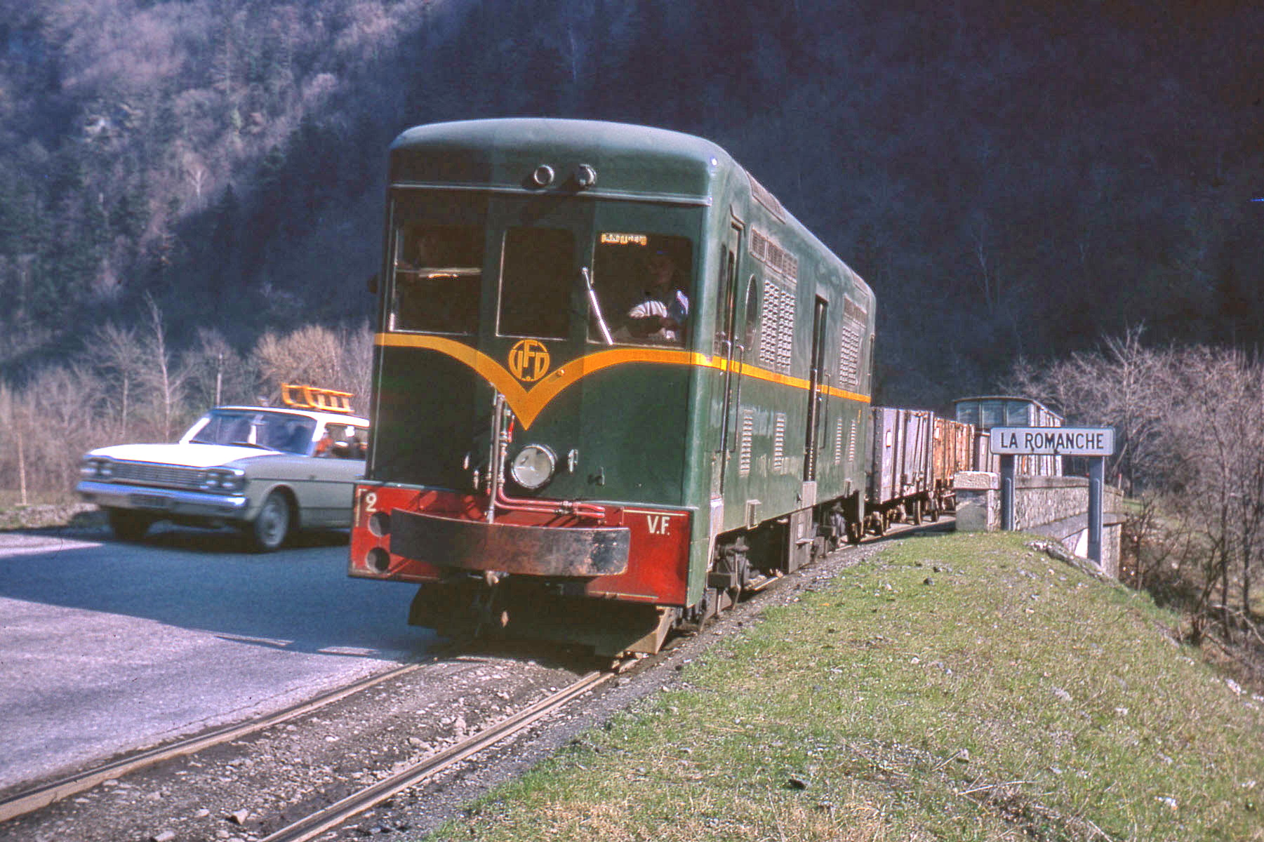 Train des VFD dans la Vallée de la Romanche, au sud de Grenoble.